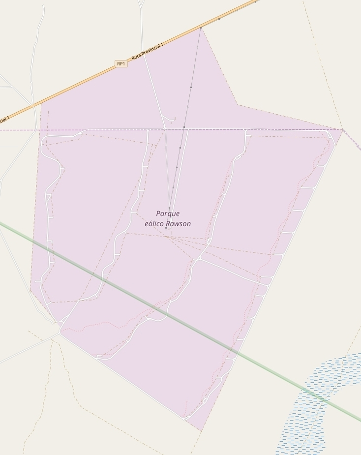 Plano del parque eólico de Rawson This map may be incomplete, and may contain errors. Don't rely solely on it for navigation.